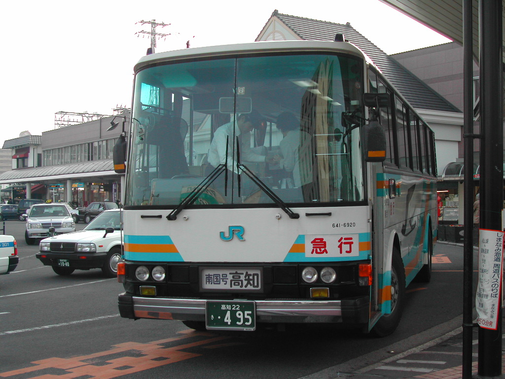 松山高知急行線 南国号 松山駅前にて撮影